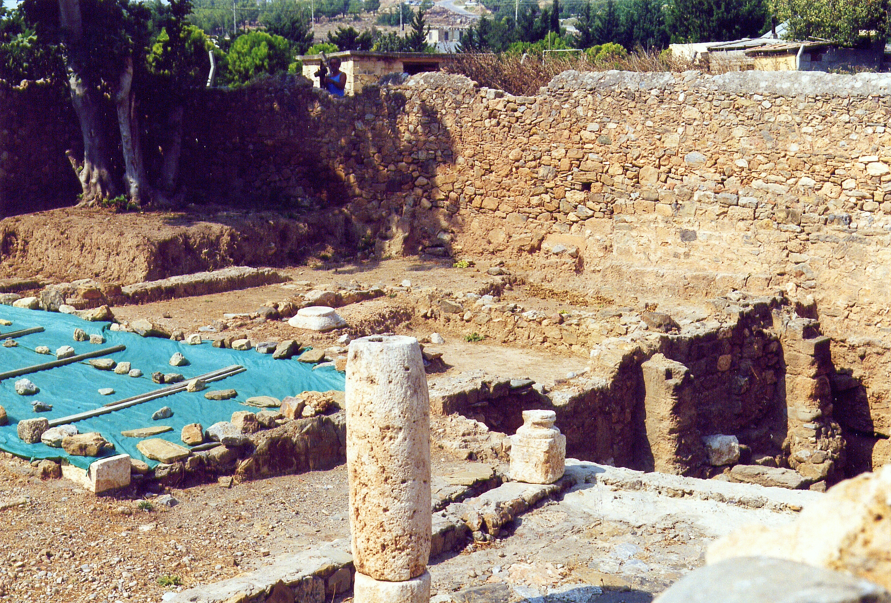 Grabung in Kelenderis, Aydıncık, Südtürkei